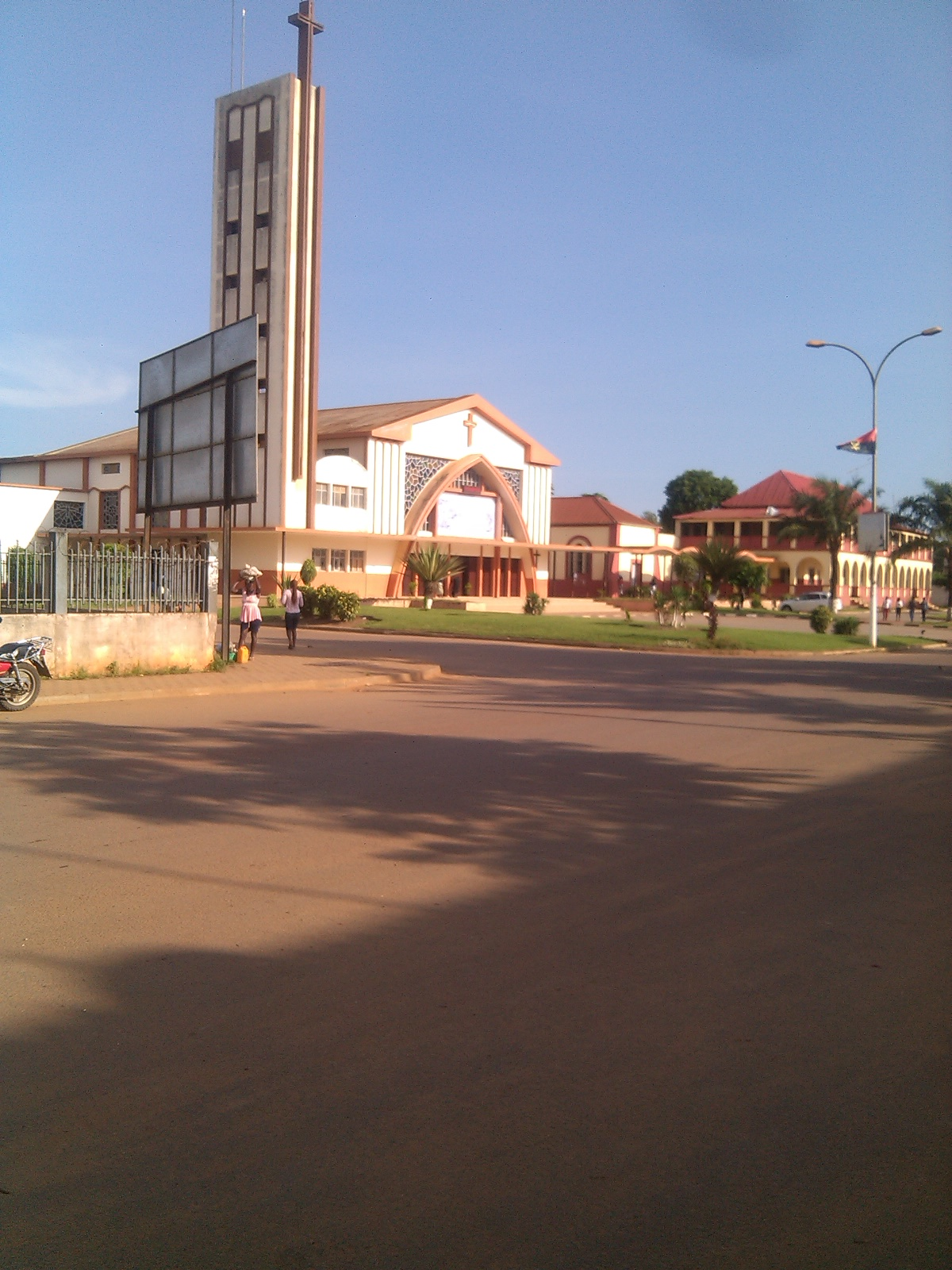 Igreja católica São João Baptista, conhecida simplesmente como Se Catedral está localizada na cidade de N'dalatando província do Kwanza Norte...